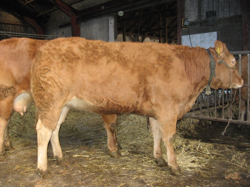 Limousine ko.